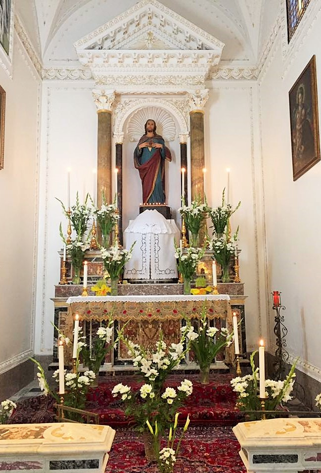 Parrocchia Maria Ss. delle Grazie - navata destra